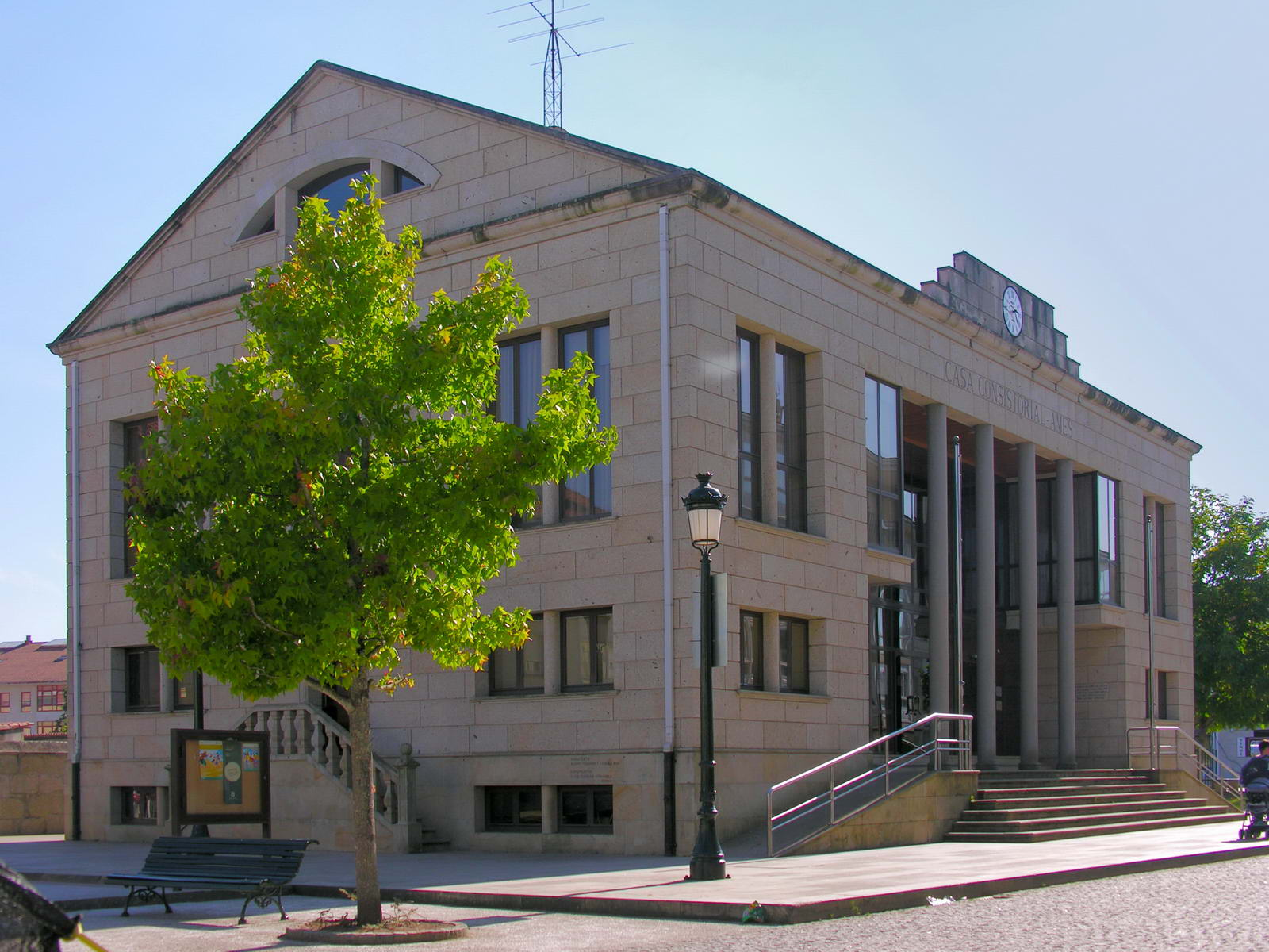 .*Galego: Bertamiráns, Ames, Galicia. Casa do concello